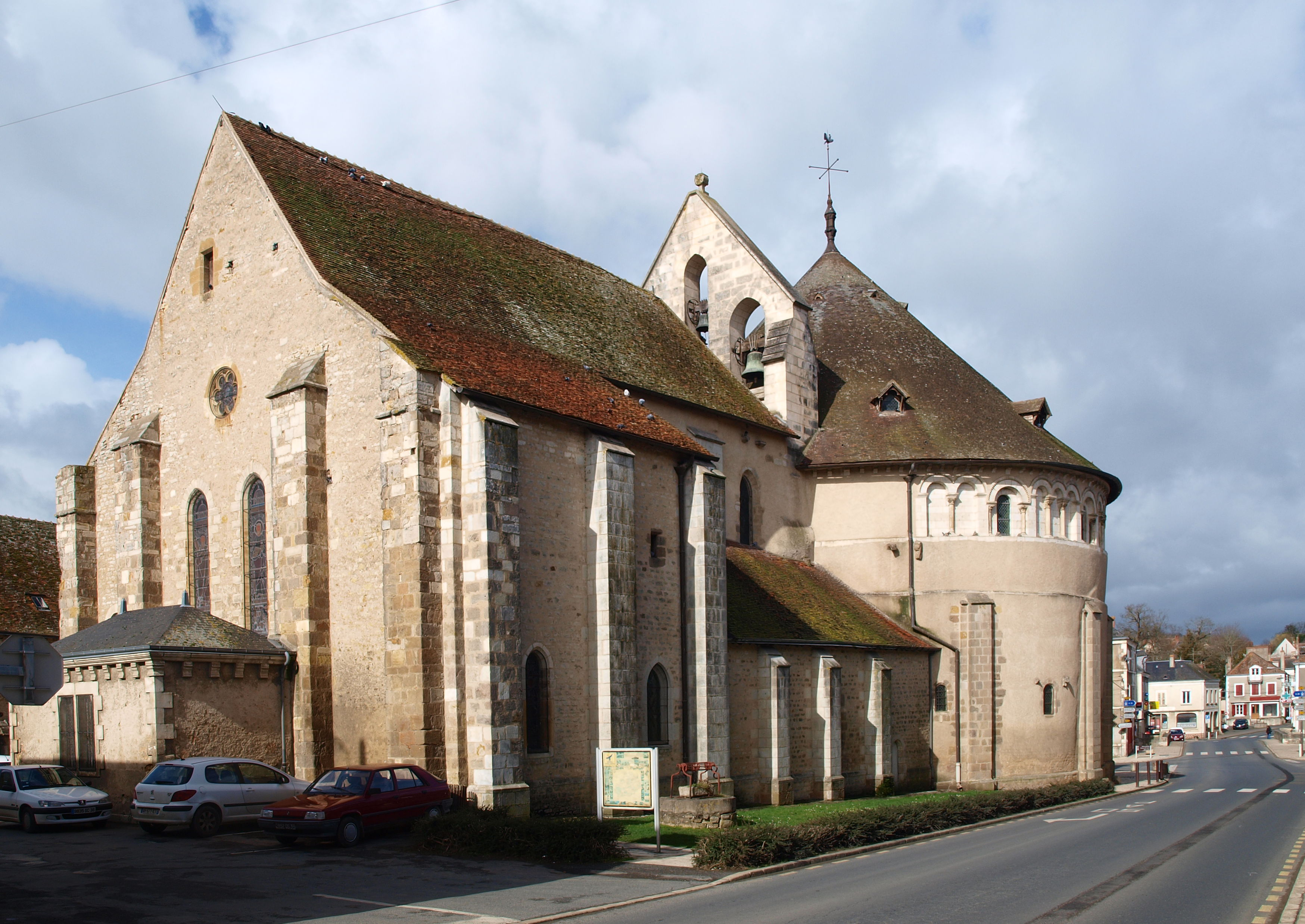 Église Saint-Étienne de Neuvy-Saint-Sépulchre (Indre, France)